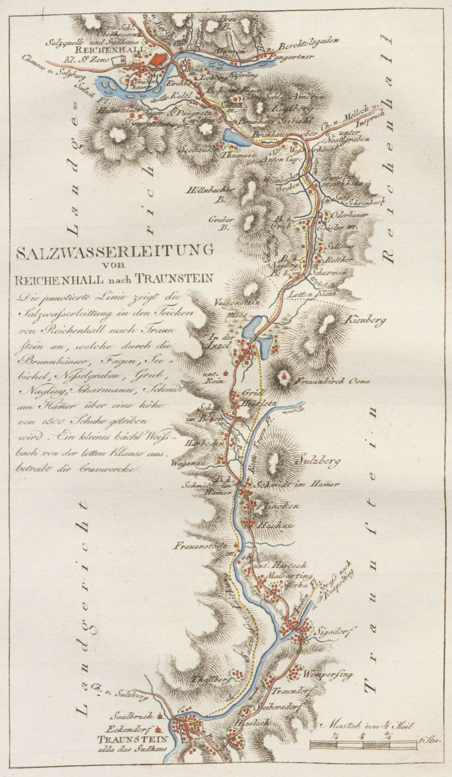 Salzwasserleitung von Reichenhall nach Traunstein aus Riedl, Adrian von / Lentner, Joseph: Reise Atlas von Bajern oder Geographisch-geometrische Darstellung aller bajrischen Haupt- und Landstraßen mit den daranliegenden Ortschaften und Gegenden, nebst Kurzer Beschreibungen alles dessen, was auf und an einer jeden der gezeichneten Straßen für den Reisenden merkwürdig seyn kann. [Gewidmet] Joseph August Grafen von Toerring, Bd.: 32, , München, [1803]